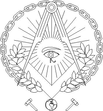 logo logia blasco ibañez